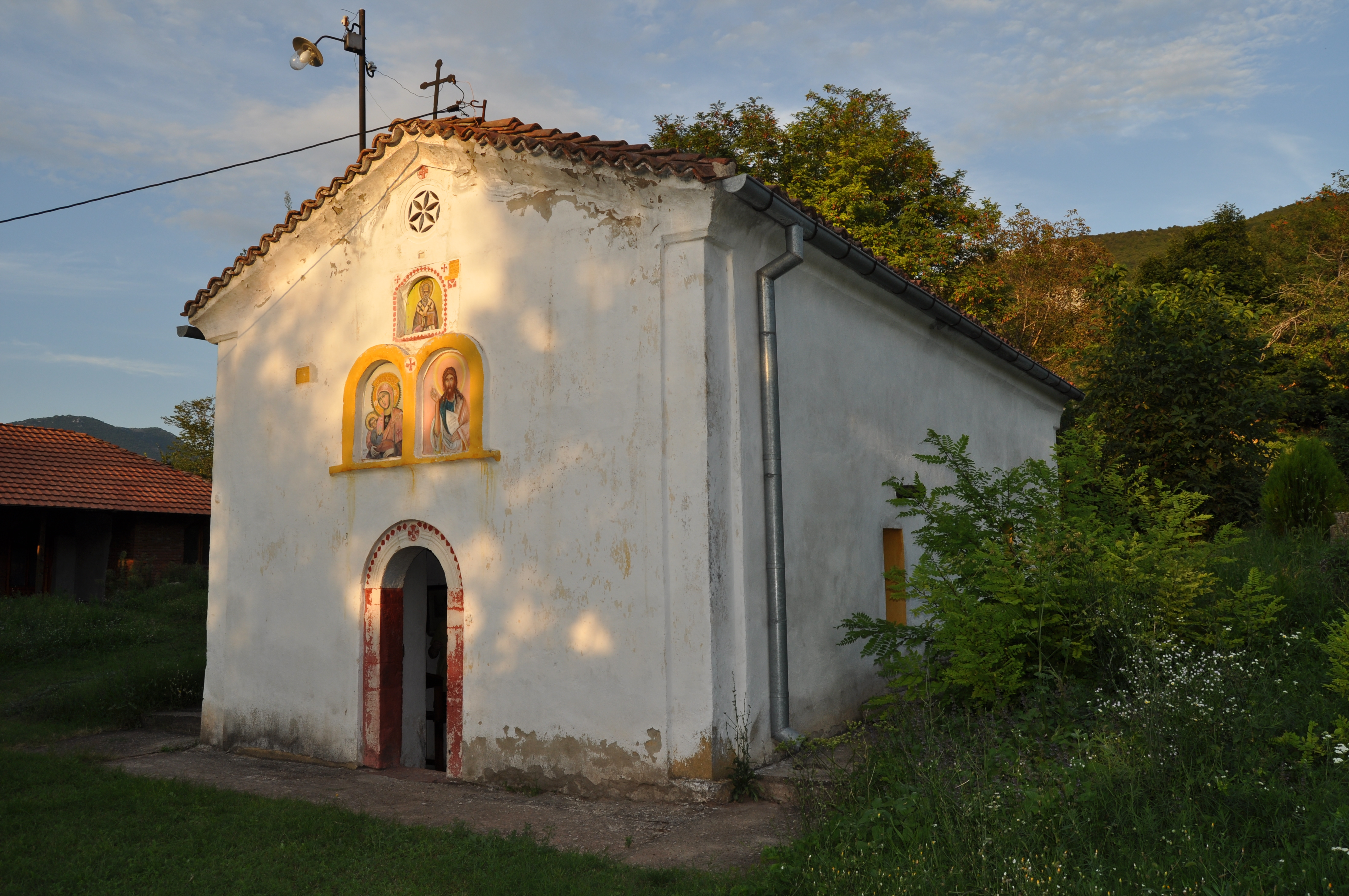 Srpski (latinica): Crkva je sagrađena 1838. godine. Nalazi se u selu Manastir u blizini sela Prosek na ulazu u Sićevačku klisuru iz pravca Niša. Pored nje je je o grpblje sa nekoliko očuvanih starih kamenih, lepo urađenih nadgrobnih krstova